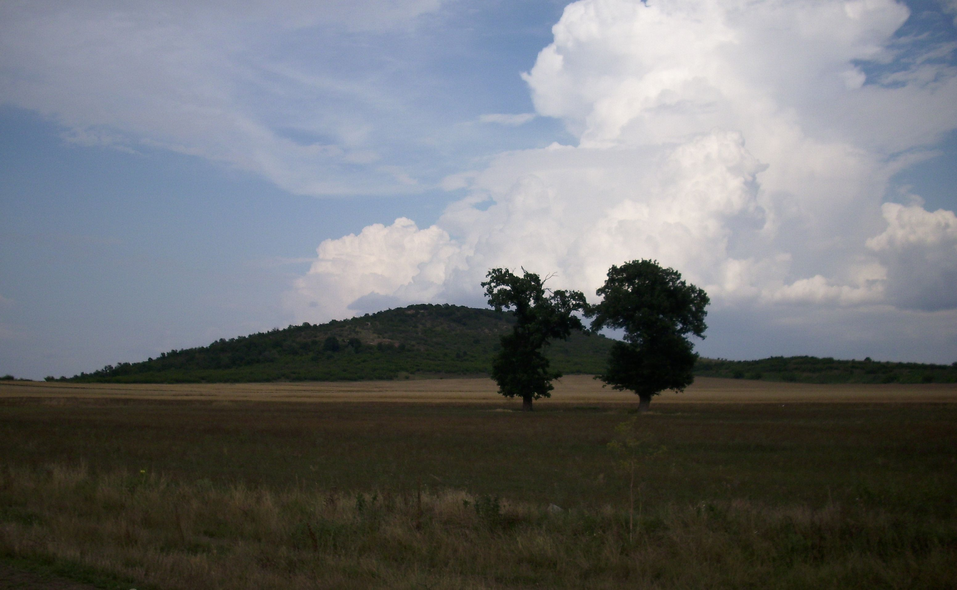 Зайчи връх